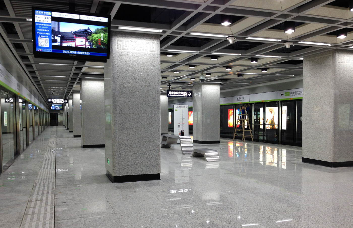 中文（中国大陆）: 武汉地铁4号线武昌火车站站台